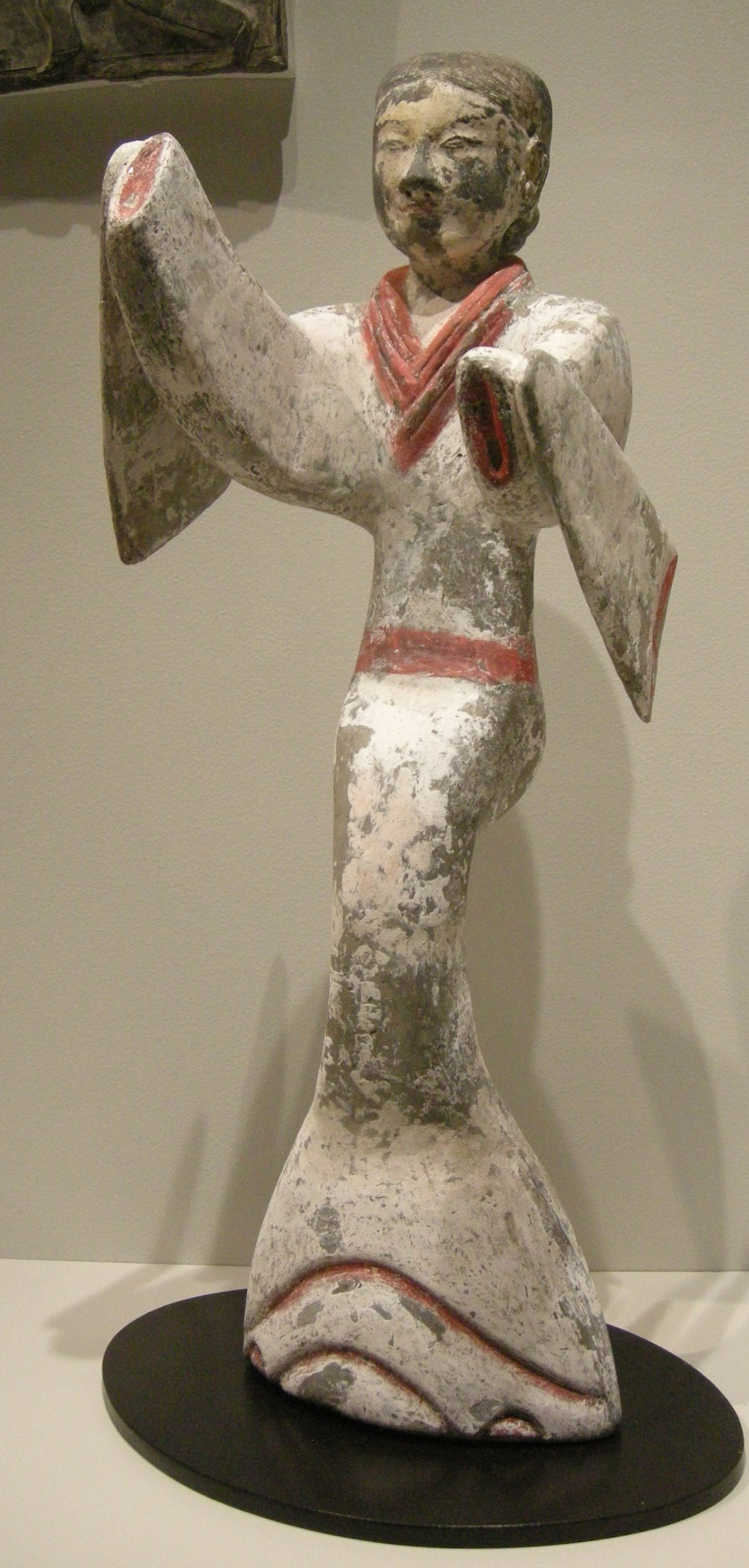 Nswag, dinastia Han, figurina dipinta di danzatrice.